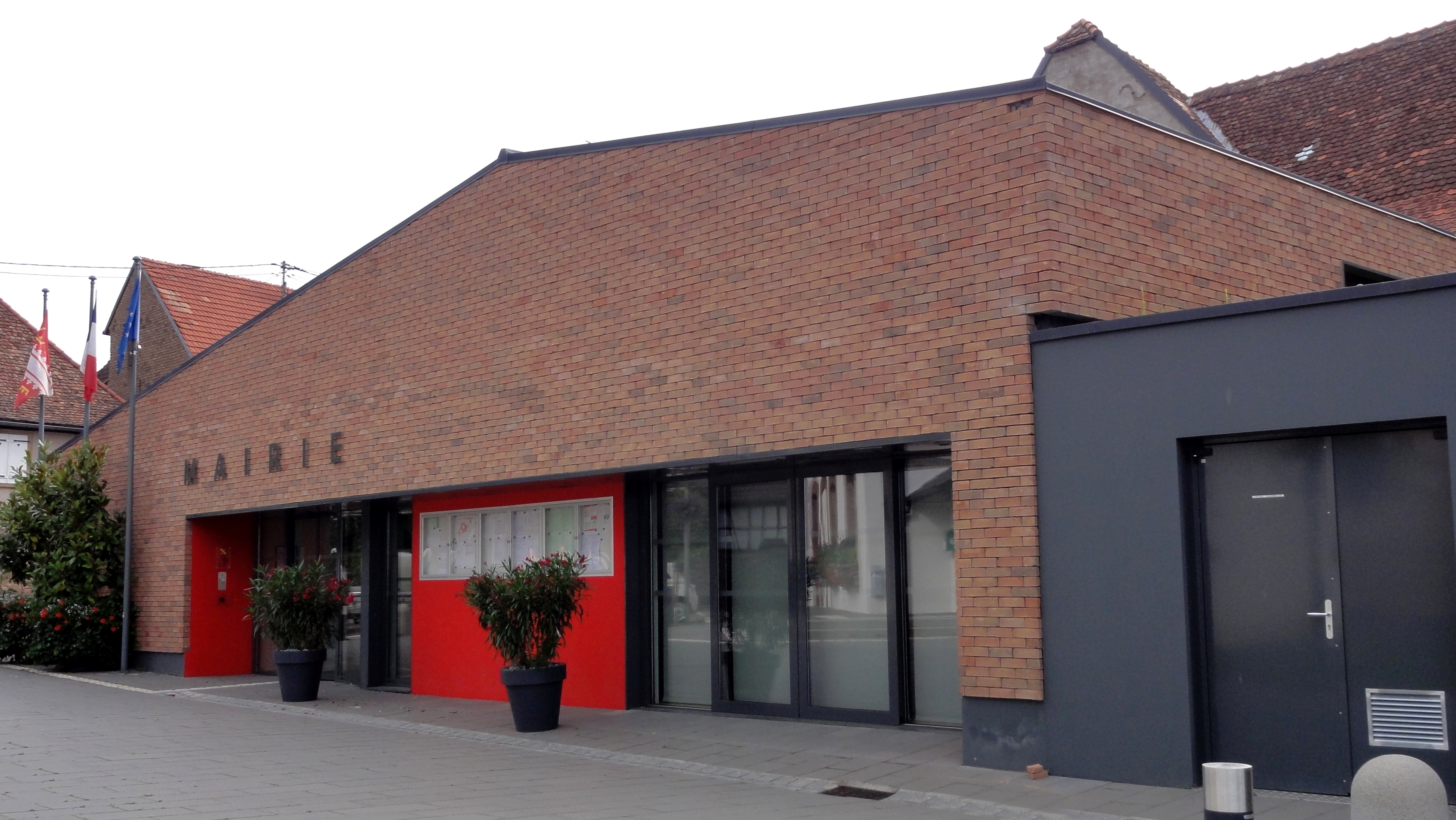 Alsace, Bas-Rhin, Hurtigheim, Nouvelle mairie (XXIe), Rue Principale.